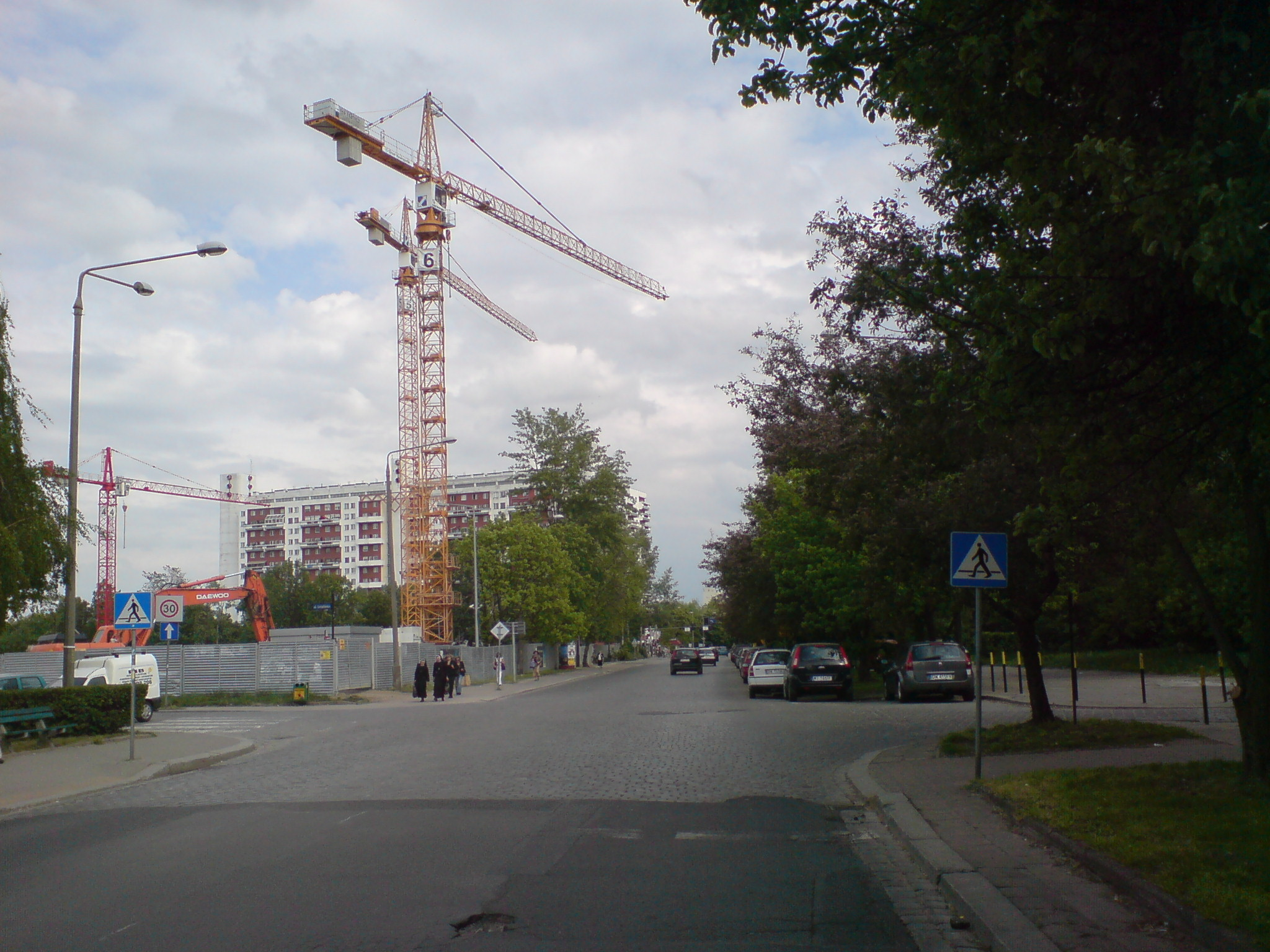 odcinek zachodni ulicy Wielkiej we Wrocławiu przy skrzyżowaniu z ul. Gwiaździstą (po lewej); widoczne po lewej żurawie budowlane - plac budowy Sky Tower; w głębi skrzyżowanie (ze światłami) z ul. Powstańców Śląskich